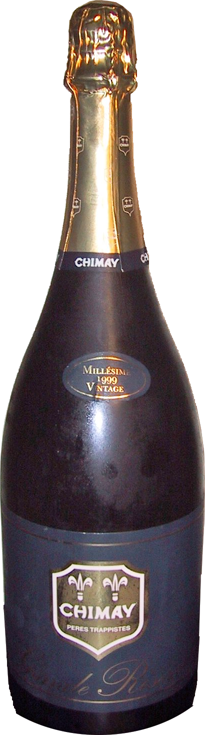 Magnum of Chimay bleue grande réserve, millésime 1999 Vintage, trappist beer (Belgium).